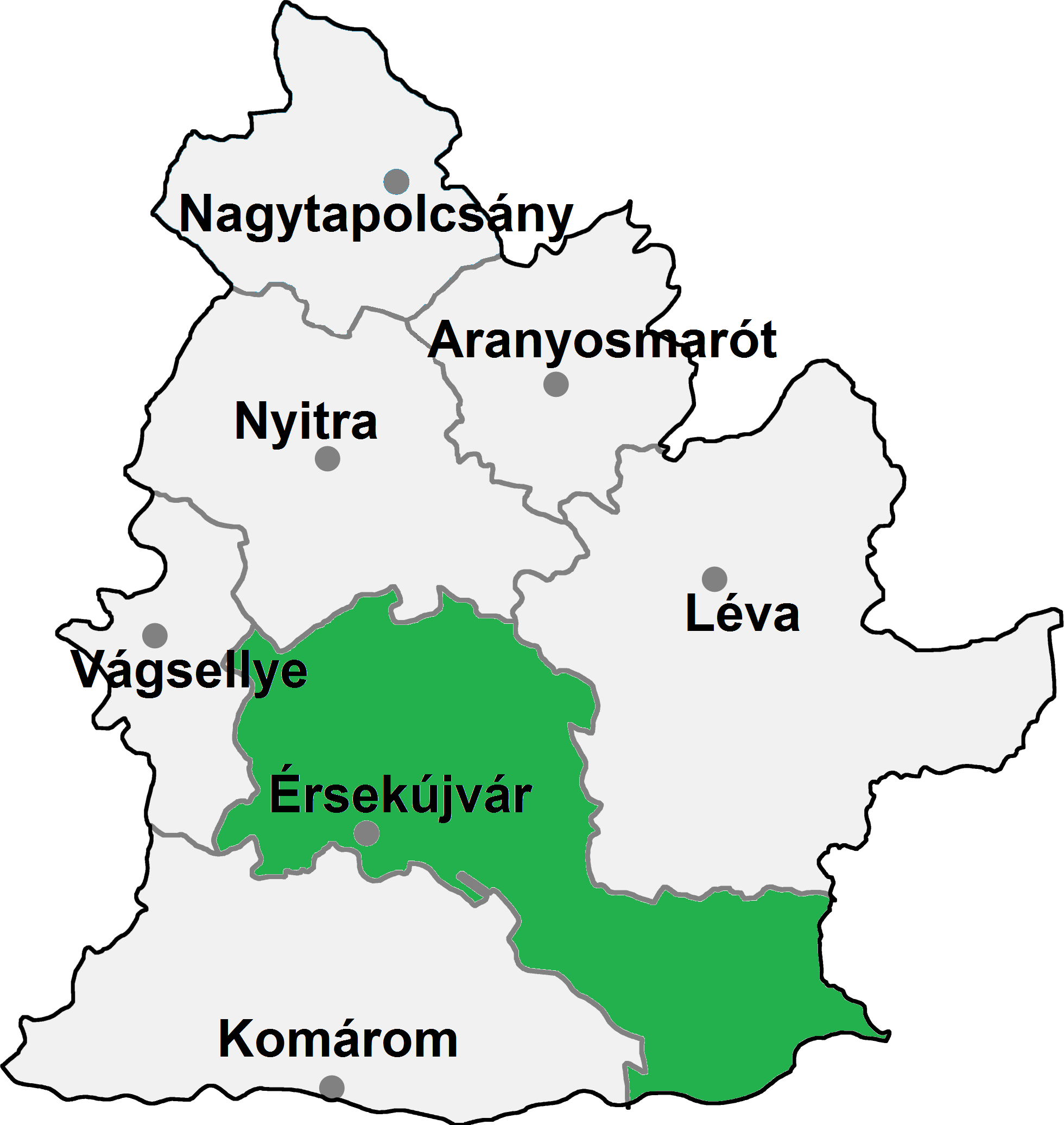 Érsekújvári járás